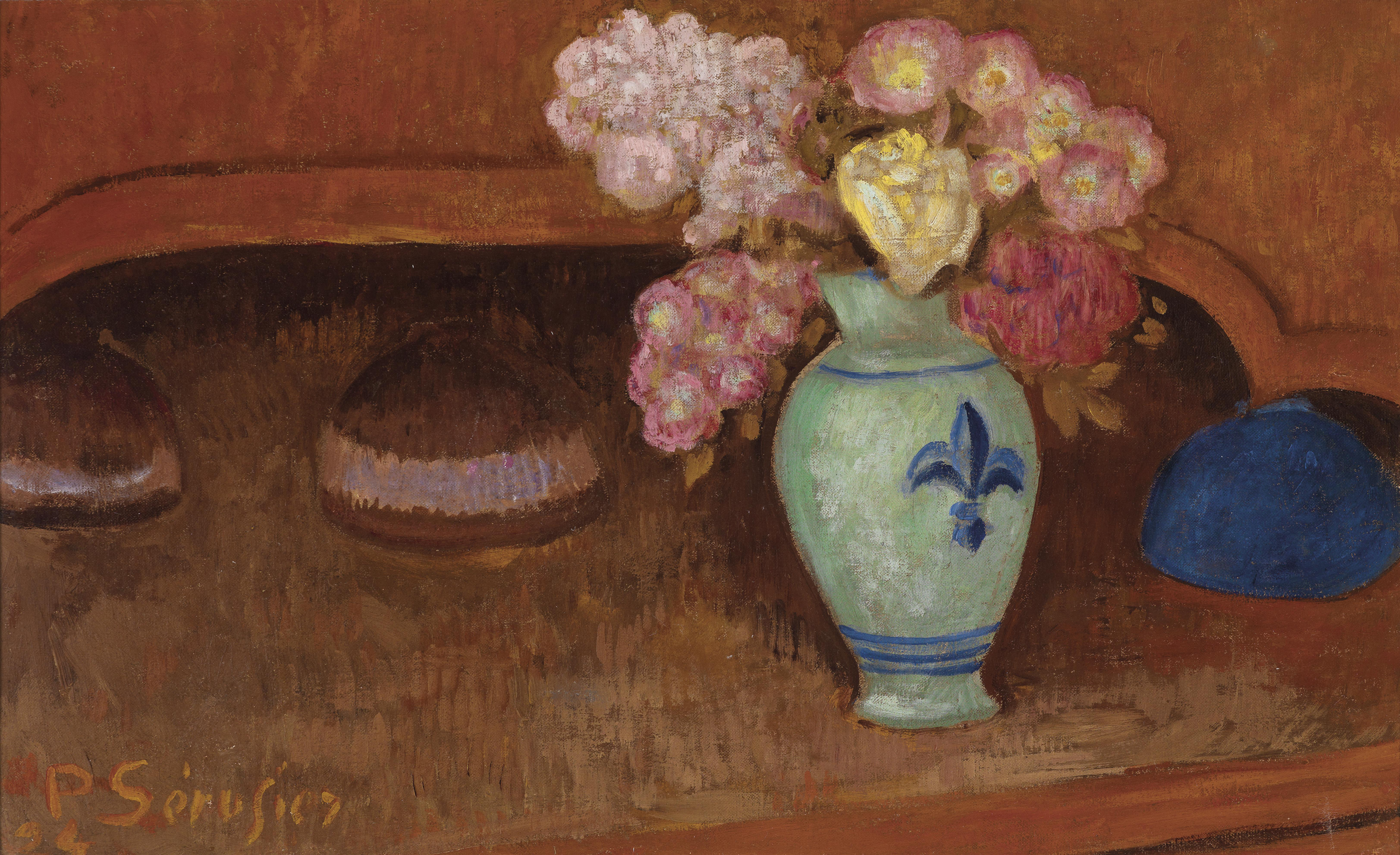 Les Roses, signiert, datiert P. Sérusier 24, Öl auf Leinwand, 38 x 61 cm